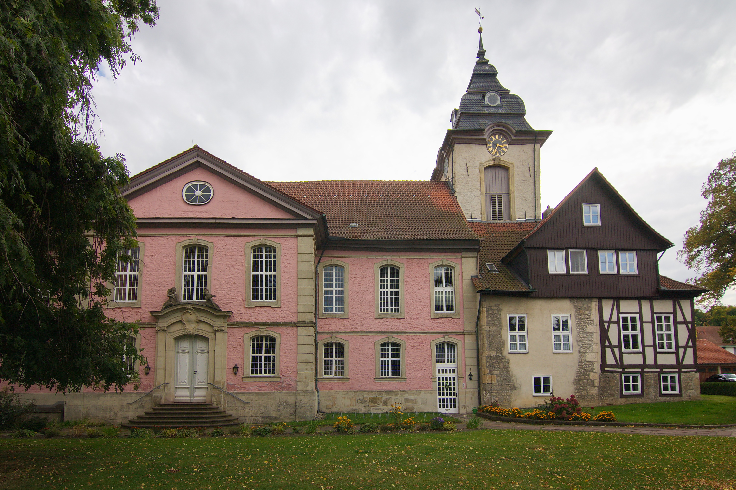 Das Stift Steterburg ist ein ehemaliges Kanonissenstift, späteres Augustiner-Chorfrauen-Stift und ehemaliges evangelisch-lutherisches Frauenstift in Salzgitter-Thiede, in Niedersachsen. Erhaltene Gebäudeteile sind aus dem 11. Jahrhundert. Das Wohnhaus der Äbtissin entstand 1691. Die Stiftskirche ist 1752 errichtet worden.